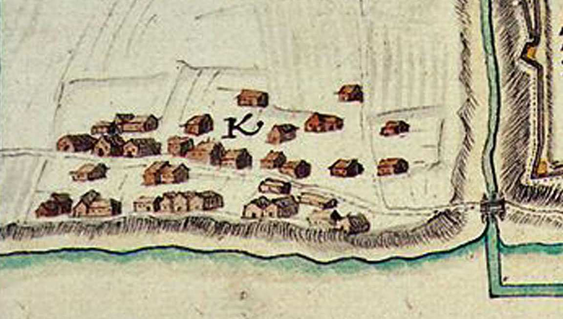 Частка плана Полацка 1707 г. з выявай Запалоцця